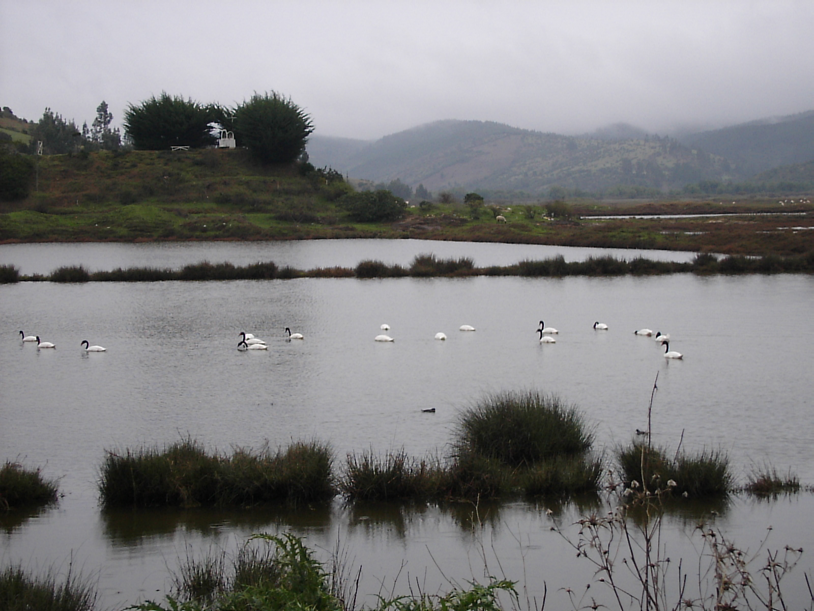 Cisnes en Cahuil